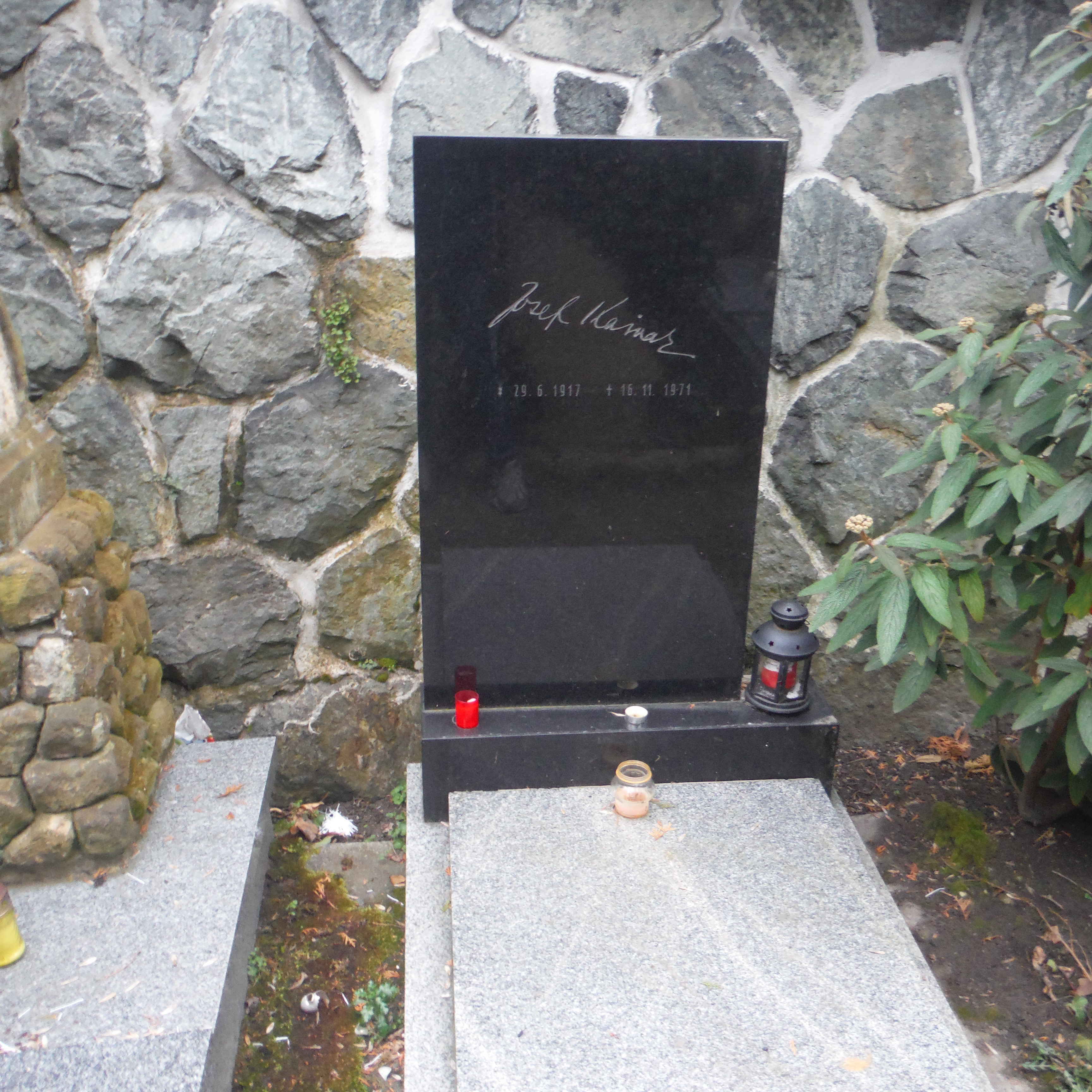 HROB